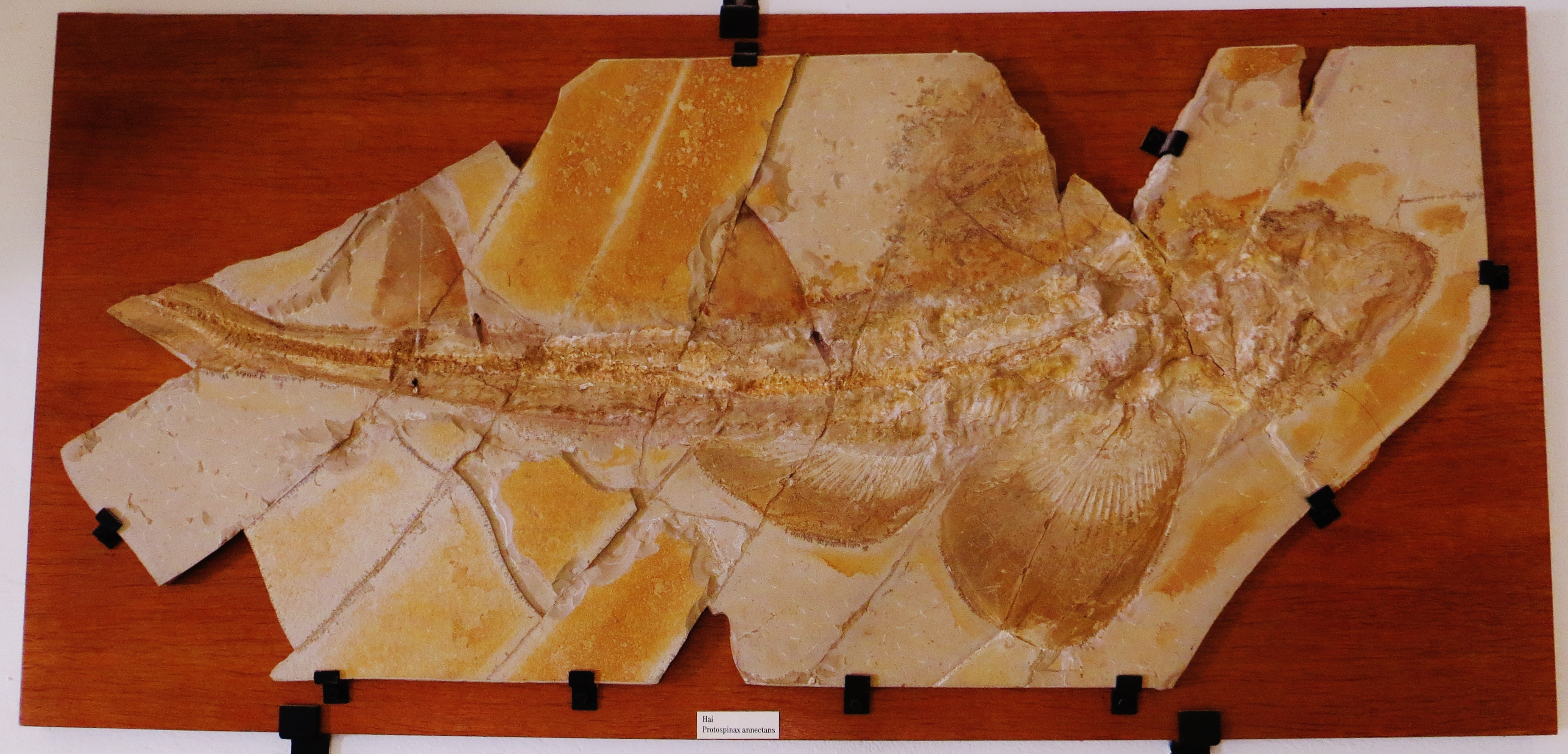 Took the picture at Museum Berger, Eichstaett